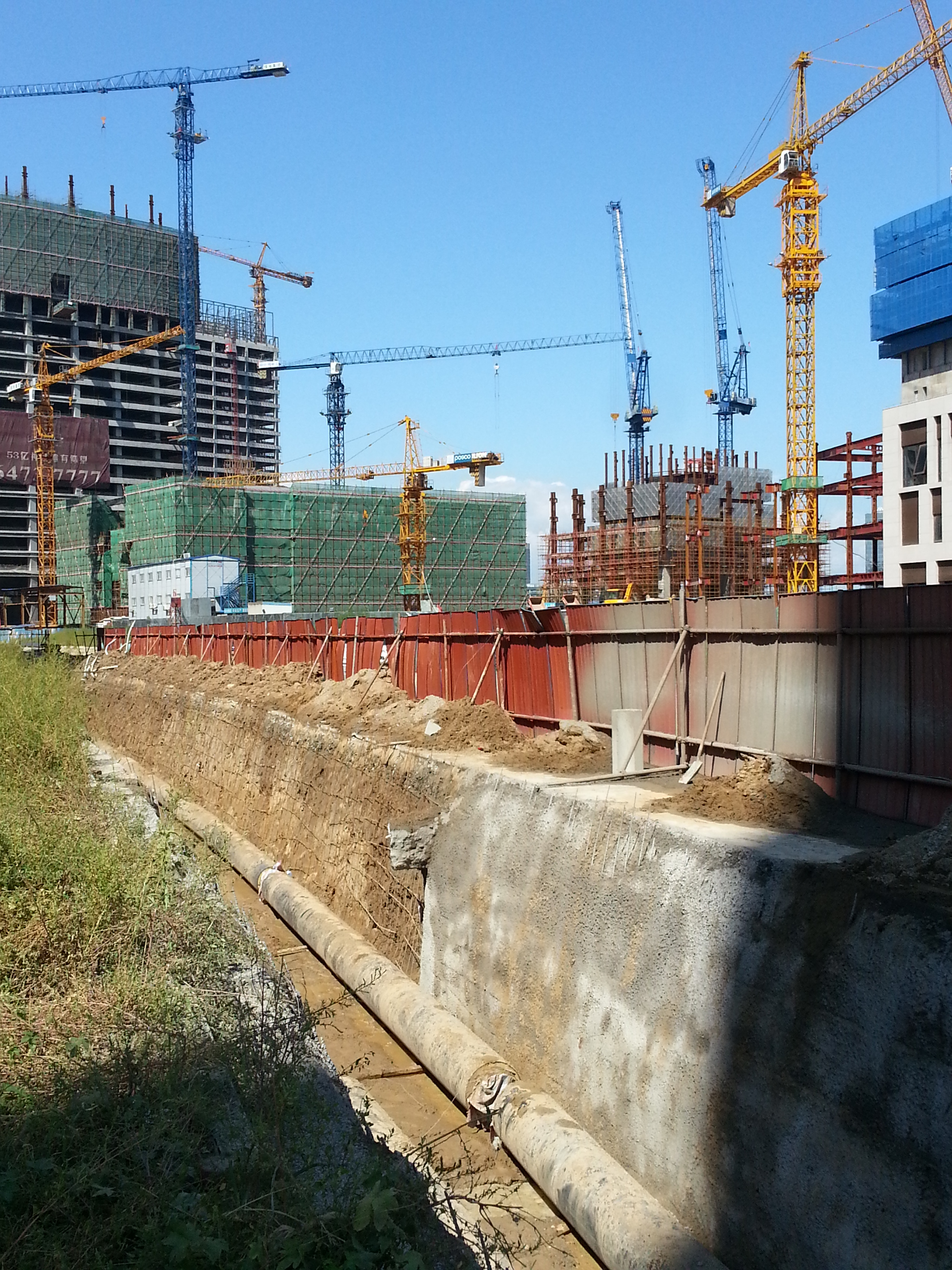 大望京商务区工地，望京最高建筑－－260米的北京绿地中心和浦项中心正在建设中